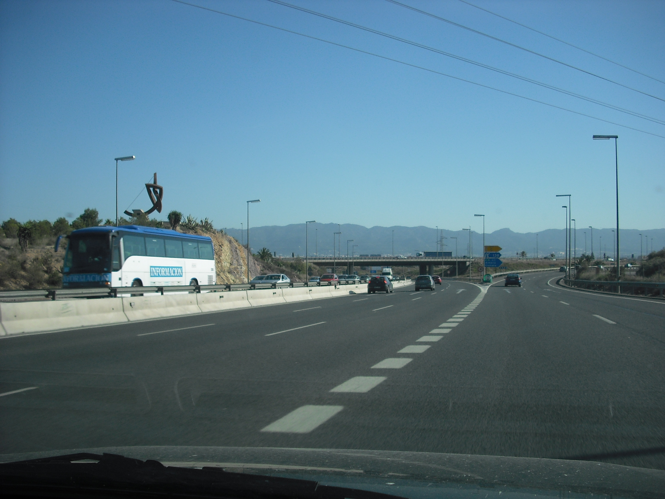 Autovía del mediterraneo a su paso por Murcia